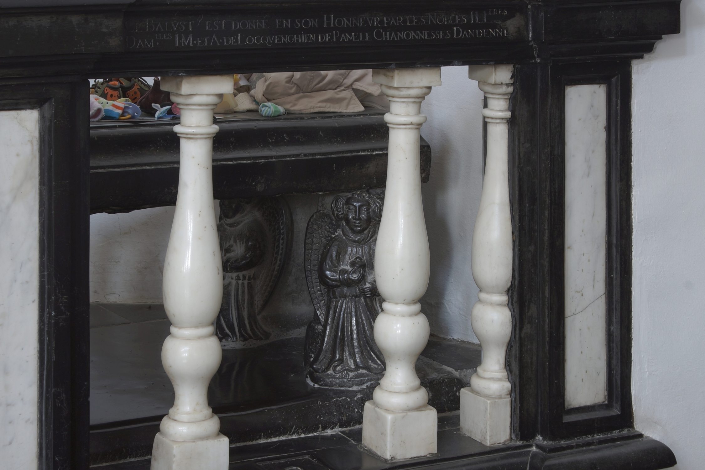 Collegiale kerk Sint-Begga (Andenne) - Graf van Sint-Begga